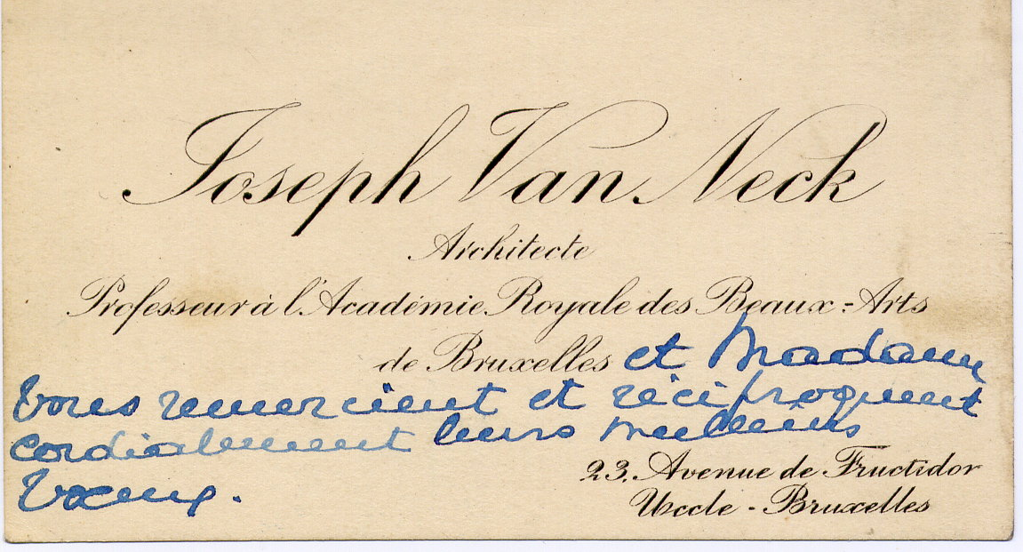 carte de visite de l'architecte Van Neck (1880–1959)